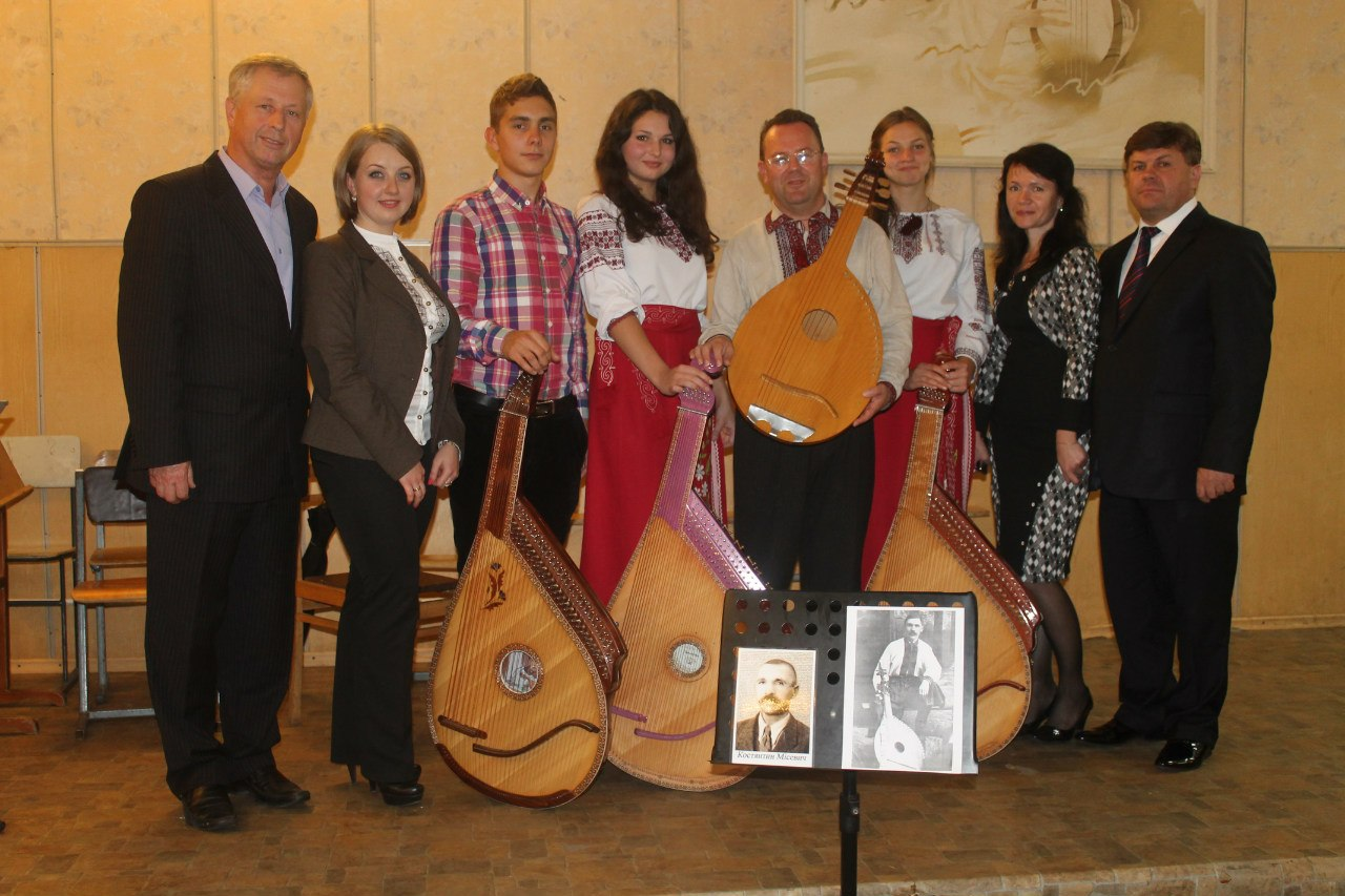 Після вечора пам'яті у Хмельницькому музичному училищі ім.В.Заремби.